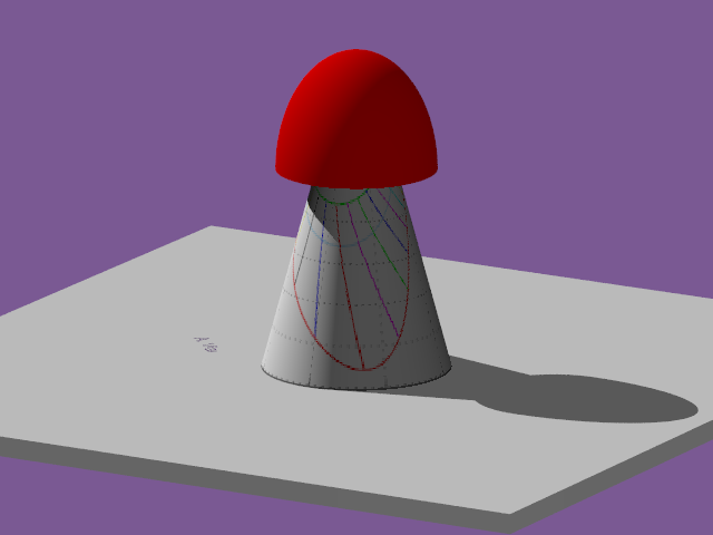 Cadran à chapeau à tronc cônique champignon